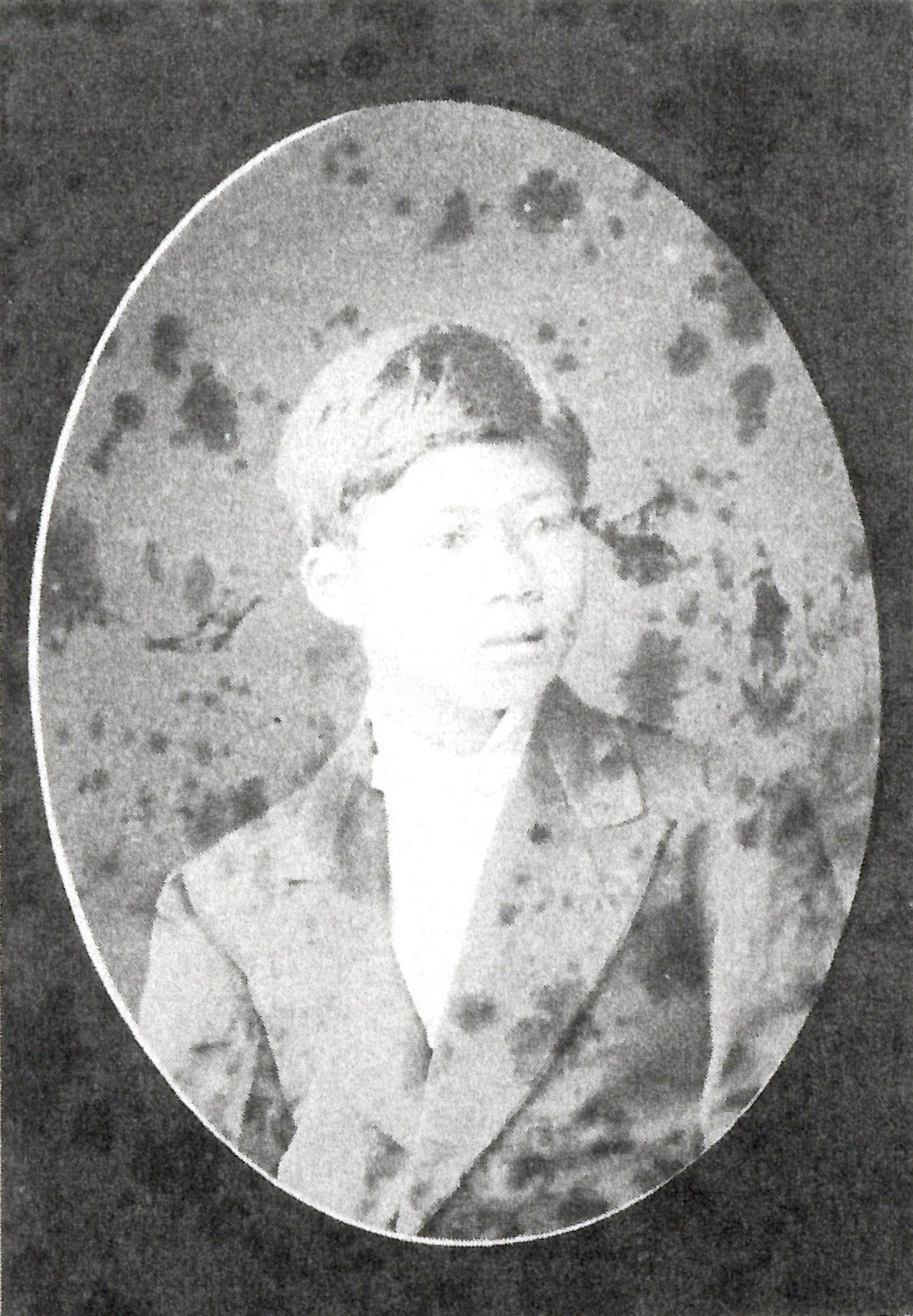 烏丸亨二郎の肖像写真。